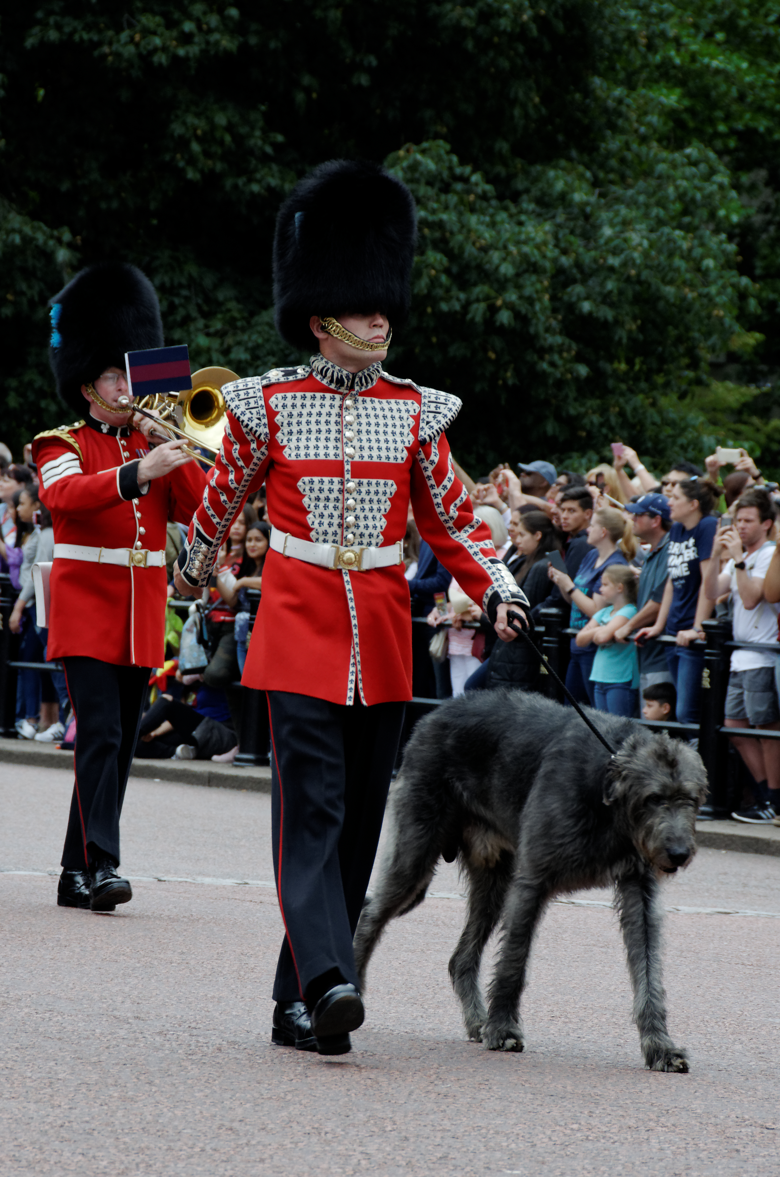 Irish Guards avec un Irish Wolfhound lors de la relève de la garde à Buckingham Palace